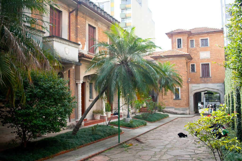 Vista do jardim no Parque Residencial Savóia, em São Paulo (SP). Ao fundo, a inscrição "Angulus ridet", em latim ("Um ângulo que sorri", em português)